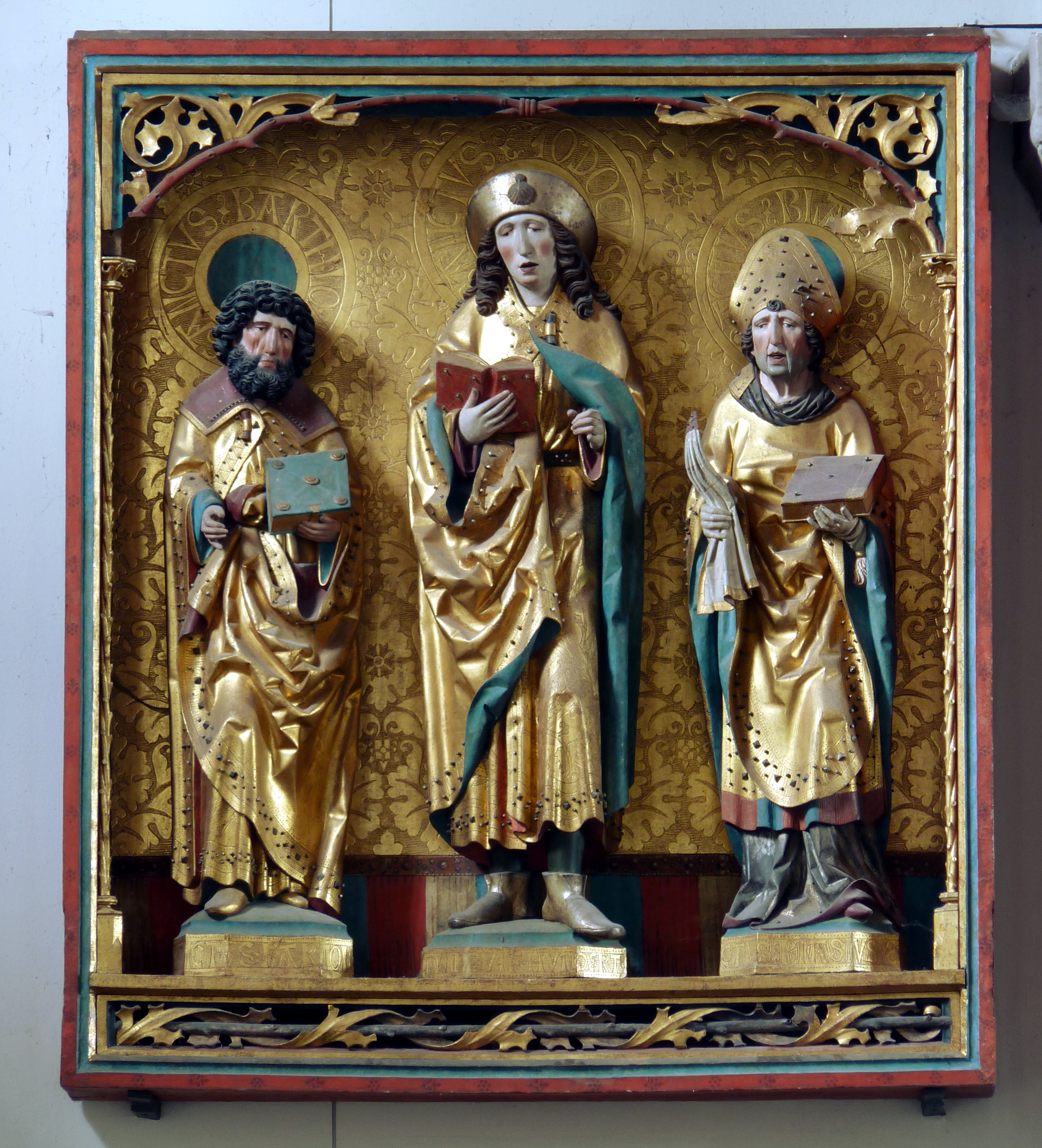 Sogenannter Jodokusschrein in der ehemaligen Klosterkirche in Reinhausen, Gemeinde Gleichen, Südniedersachsen. Datiert 1507, dem Hildesheimer Epiphaniasmeister zugeschrieben. Ehemals Mittelschrein eines Altars, dann in einer Kanzelaltarwand über der Kanzel eingelassen, heute selbständig an der Ostseite des nördlichen Seitenschiffes der Kirche. Abgebildet sind links St. Bartholomäus, rechts St. Blasius. Die mittlere Figur zeigt St. Jodocus oder St. Jakobus den Älteren, im Heiligenschein wird sie als SANCTVS IODOCVS bezeichnet, H. W. Mithoff gibt eine Bezeichnung S. JAKOB. MAJ. an, die Pilgerausstattung und die Jakobsmuschel auf dem Pilgerhut können auf beide Heilige hindeuten.